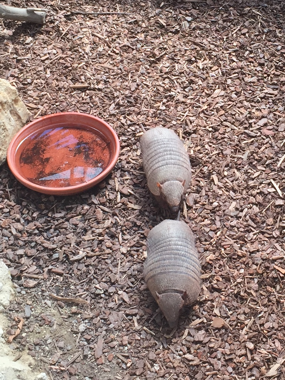 Piche llorón, pichi peludo o quirquincho chico (Chaetophractus vellerosus) en el parque Pairi Daiza (Brugelette, Bélgica). El macho está persiguiendo a la hembra para aparearse.